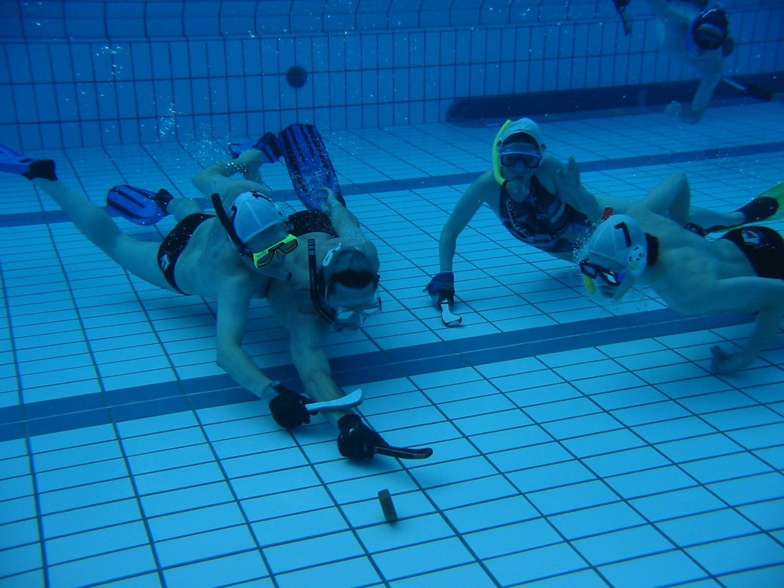 foto is gemaakt tijdens een training van zpv-piranha door een teamlid. Een ander teamlid heeft deze dan weer geupload naar wiki.